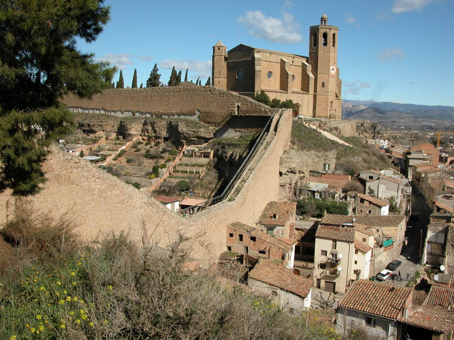 I muralla